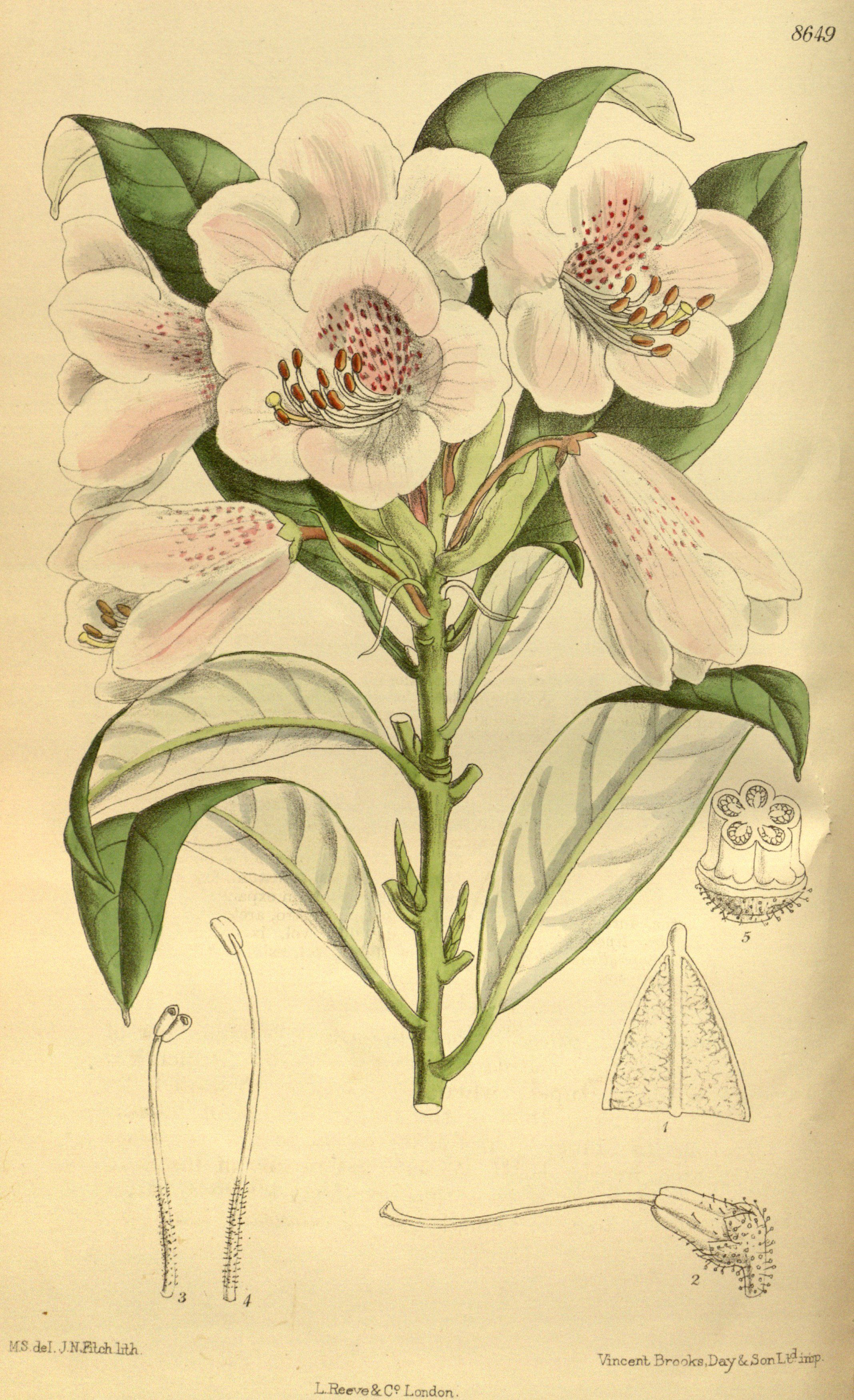 Rhododendron argyrophyllum subsp. hypoglaucum (as Rhododendron hypoglaucum), Ericaceae